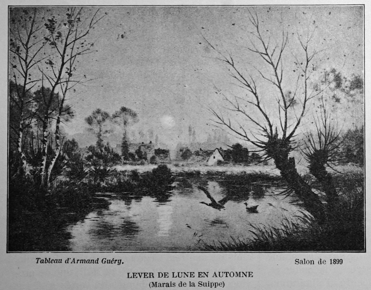 publié dans le "Bulletin de l'œuvre des voyages scolaires".